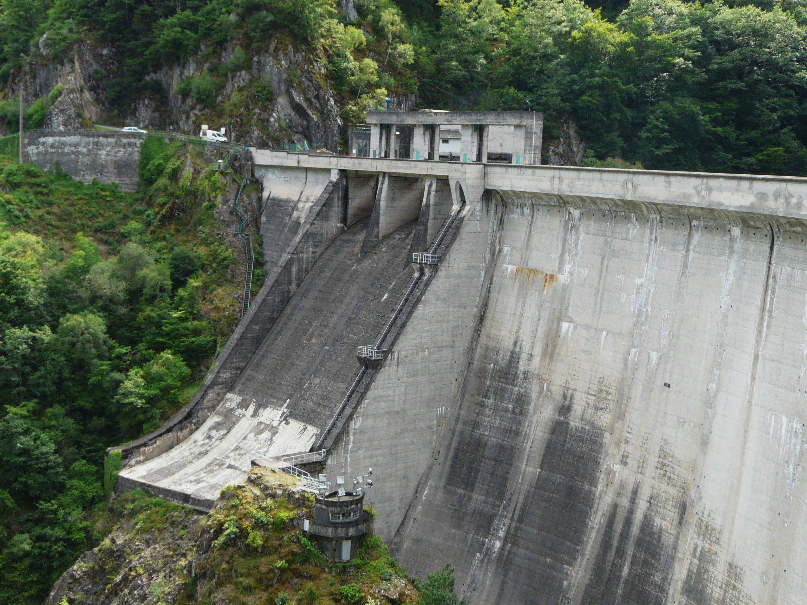 Le barrage de Marèges entre Saint-Pierre (Cantal) au premier plan et Liginiac (Corrèze) en arrière-plan.